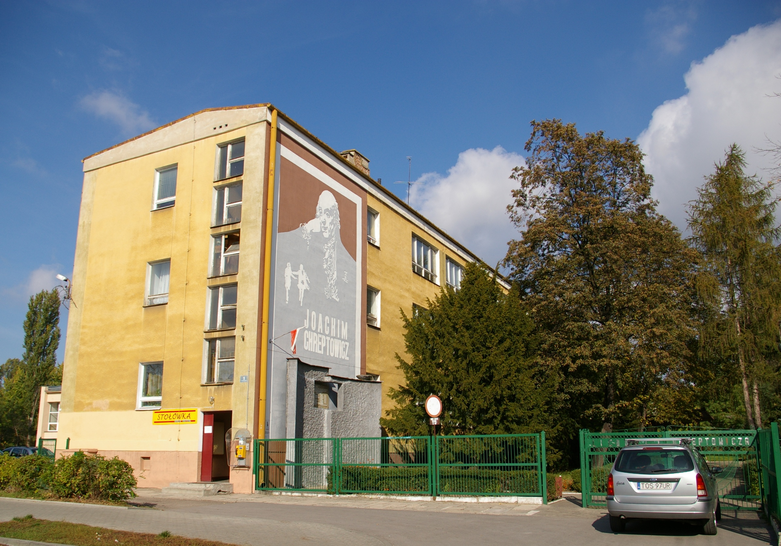 Liceum Ogólnokształcące nr II im. Joachima Chreptowicza w Ostrowcu Świętokrzyskim